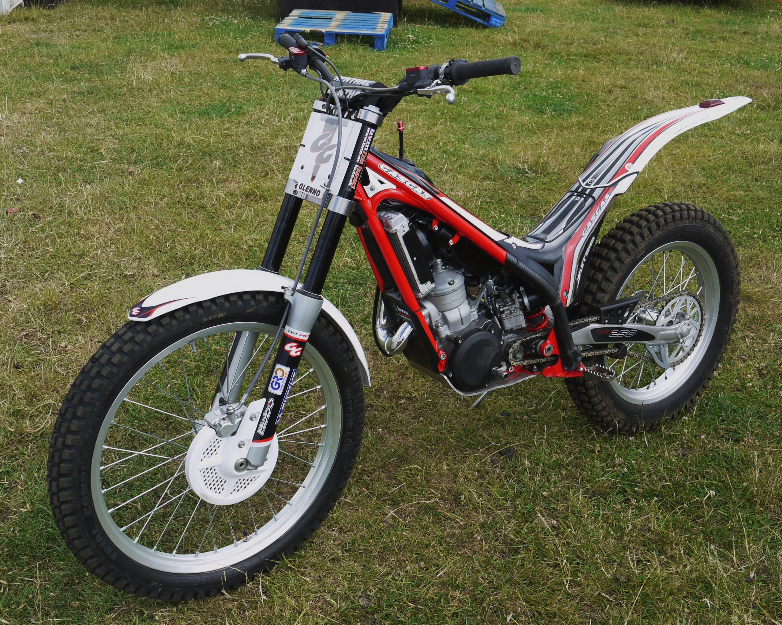 A Gas Gas trials bike